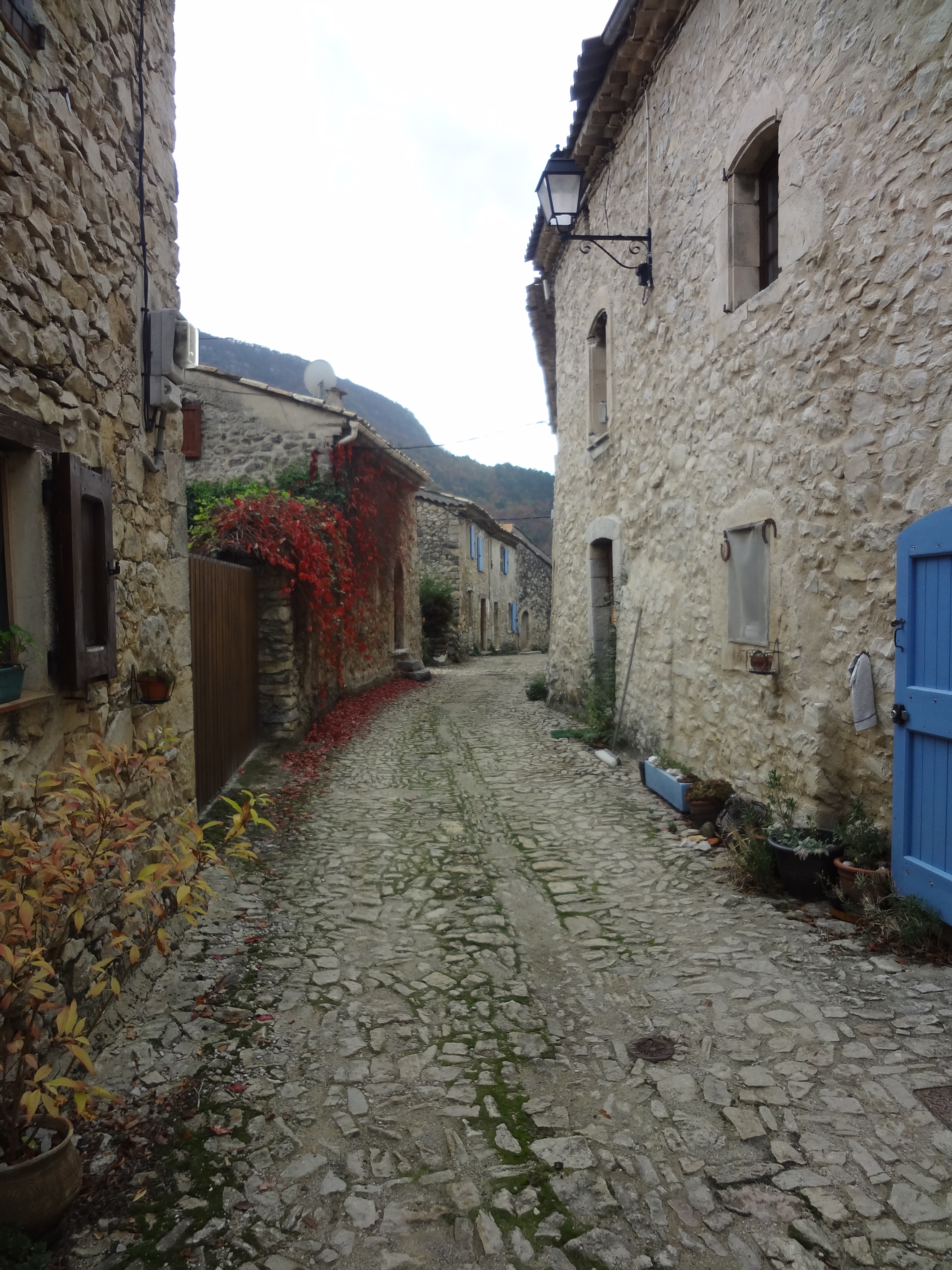 rue du village actuel de Curel (en hauteur)